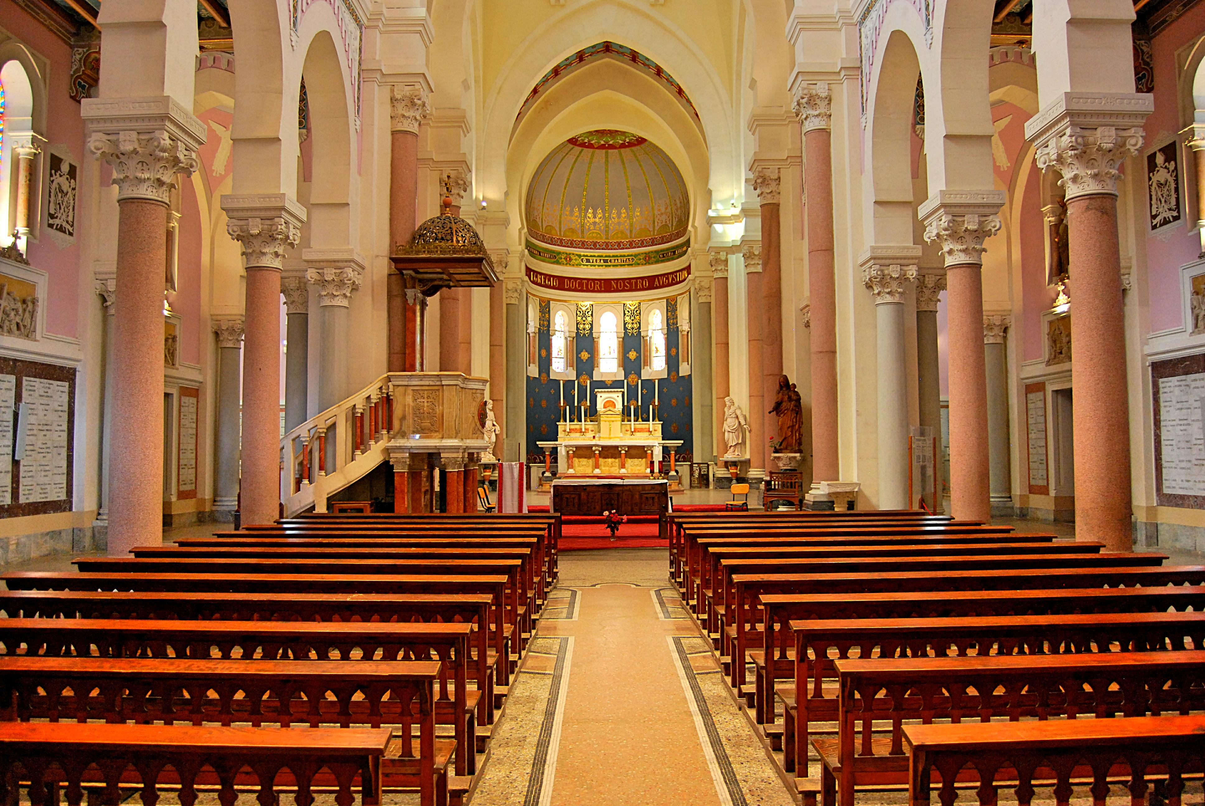 كنيسة القديس اوغسطين